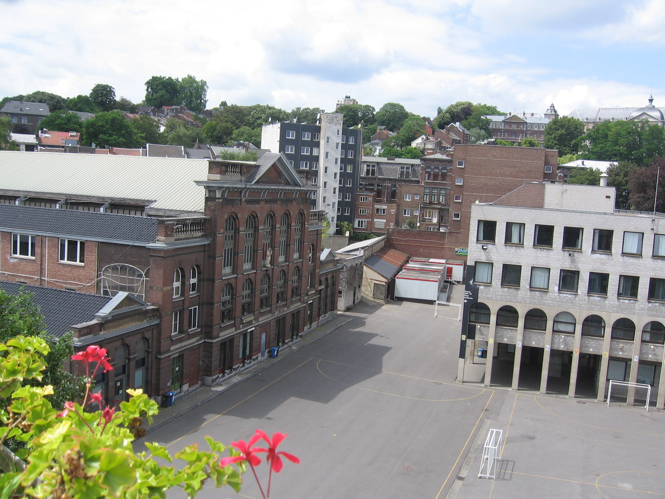 Cour intérieure du collège Saint-Servais, à Liège, en Belgique